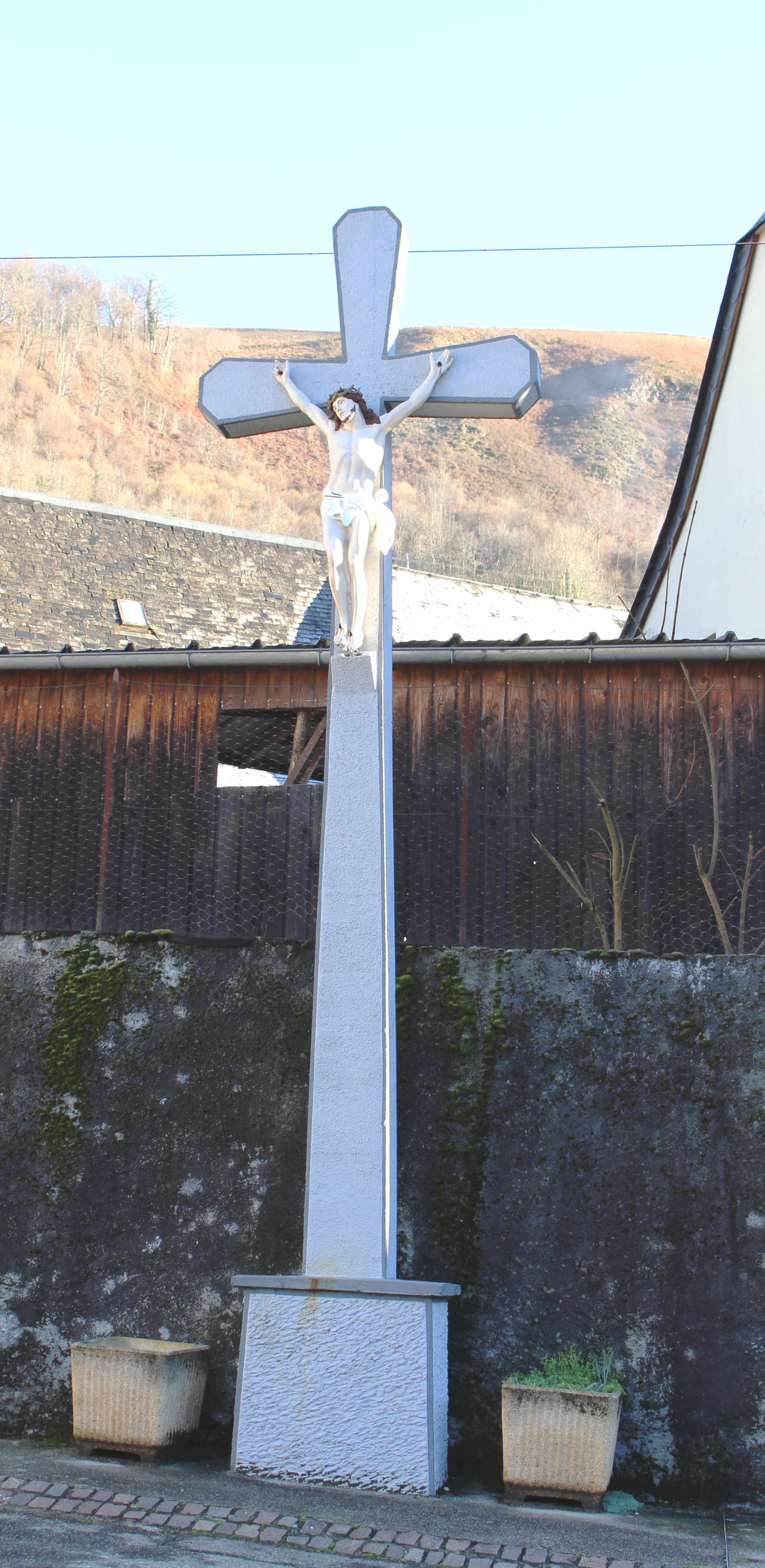 Croix de Juncalas (Hautes-Pyrénées)